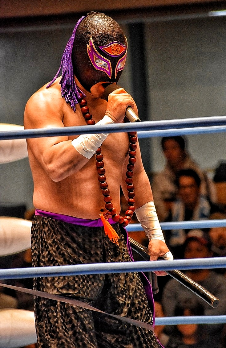 全日本プロレスのイザナギ